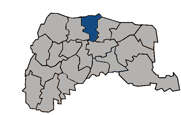 台灣省雲林縣二崙鄉 KaurJmeb於2005年1月28日為編輯zh:二崙鄉所繪製